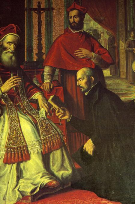 Papst Paul III. mit Kardinal Alessandro Farnese und Ignatius von Loyola